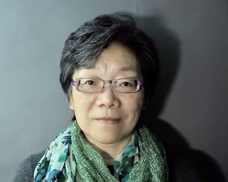 中文（台灣）: 夏林清，輔仁大學社會科學院院長。曾與吳俊宏、韋秀蓮、杜光宇聯合參選。